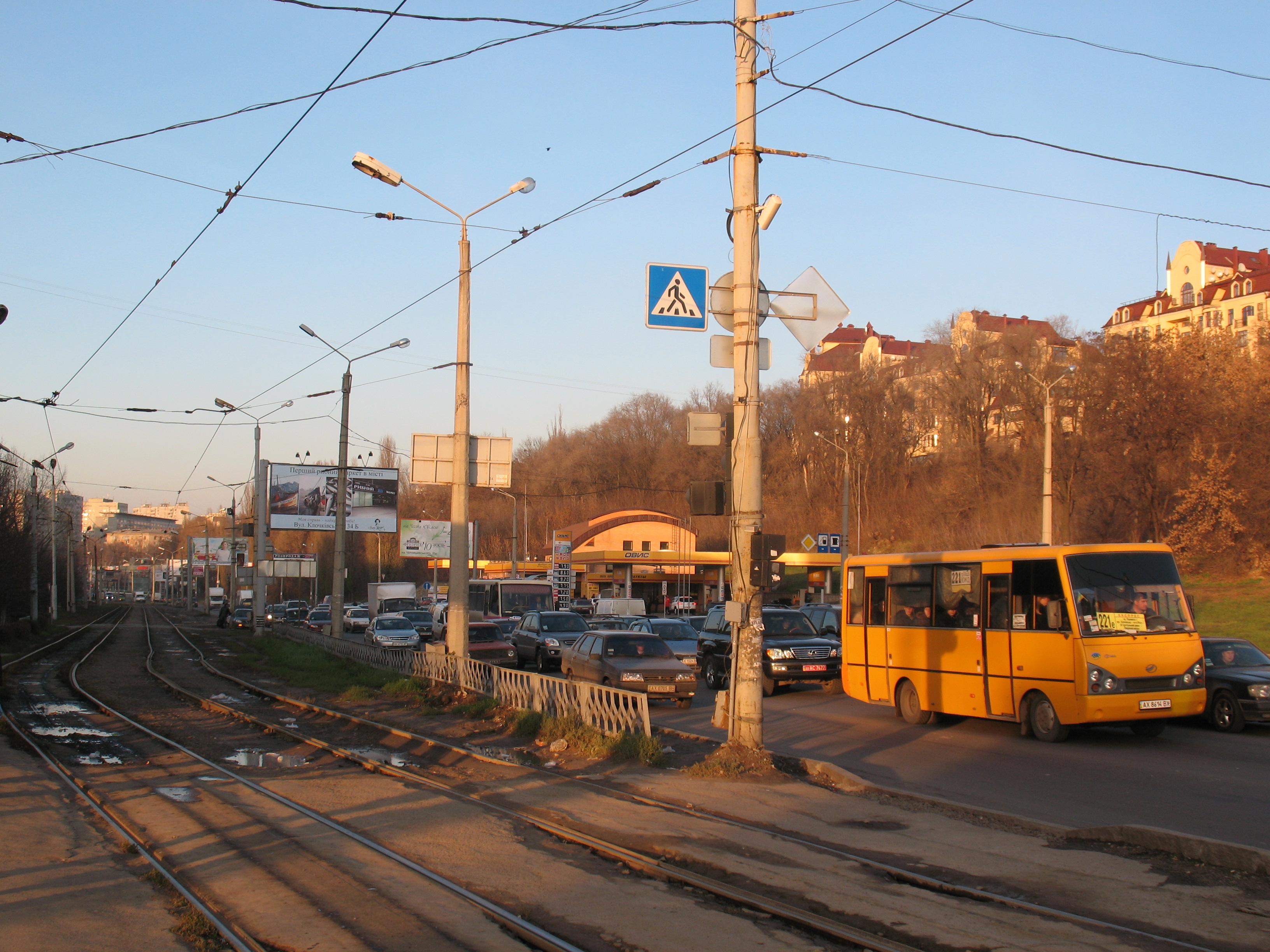 Klochkovskaya Street in Kharkov.